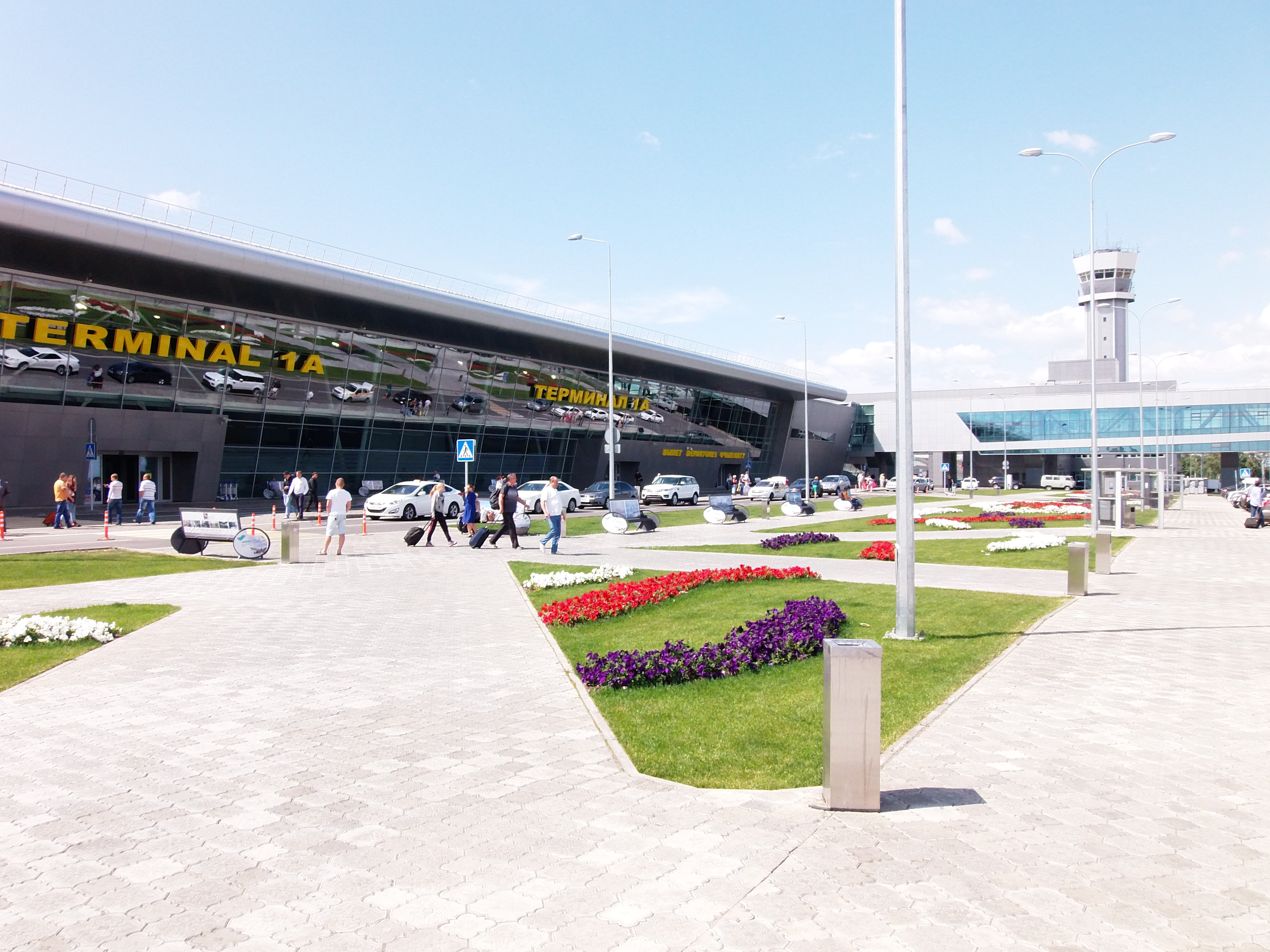 Привокзальная площадь международного аэропорта Казань